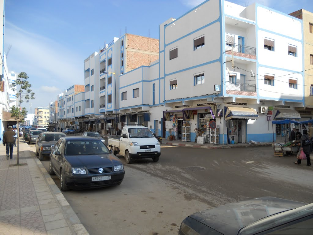 calle en imzouren